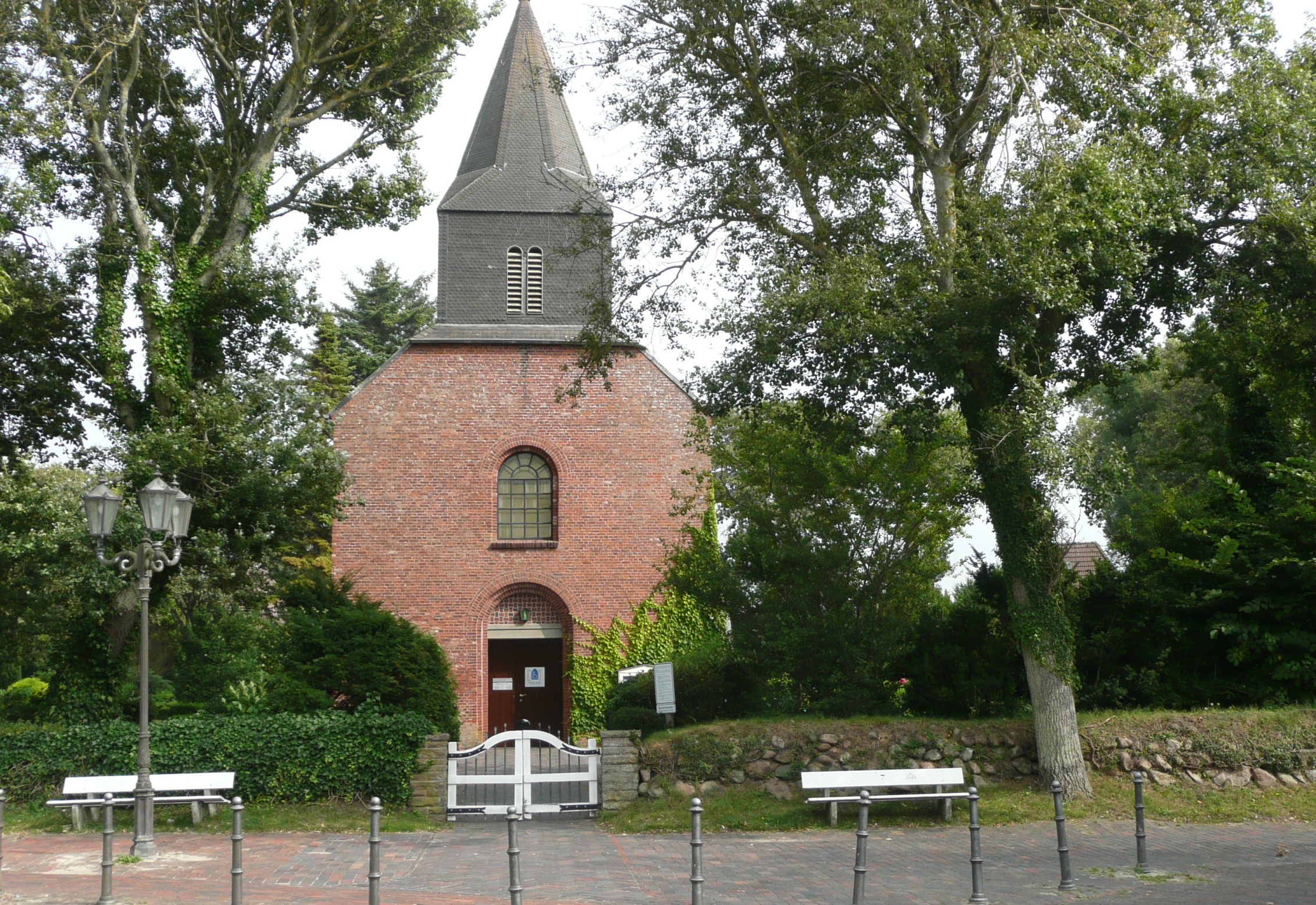 St. Niels (Westerland, Sylt)